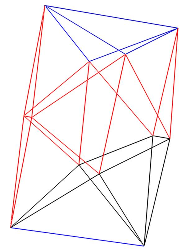 Él-test